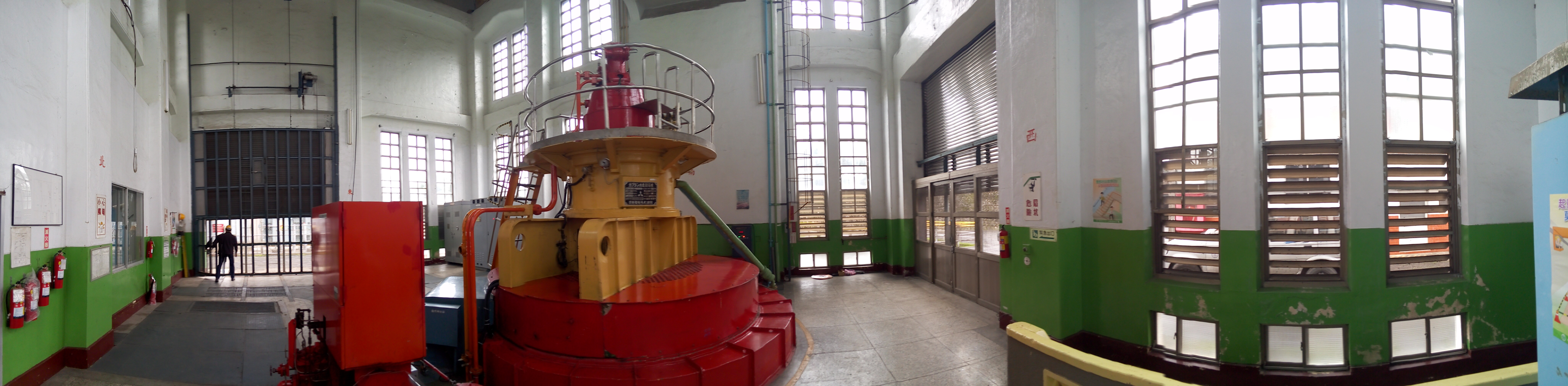 東部發電廠初英機組廠房內全景圖